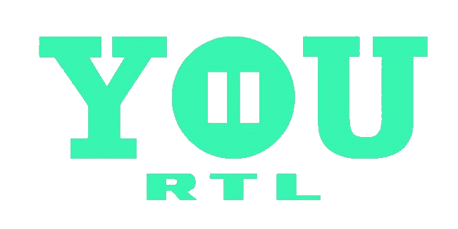 Logo von RTL II YOU